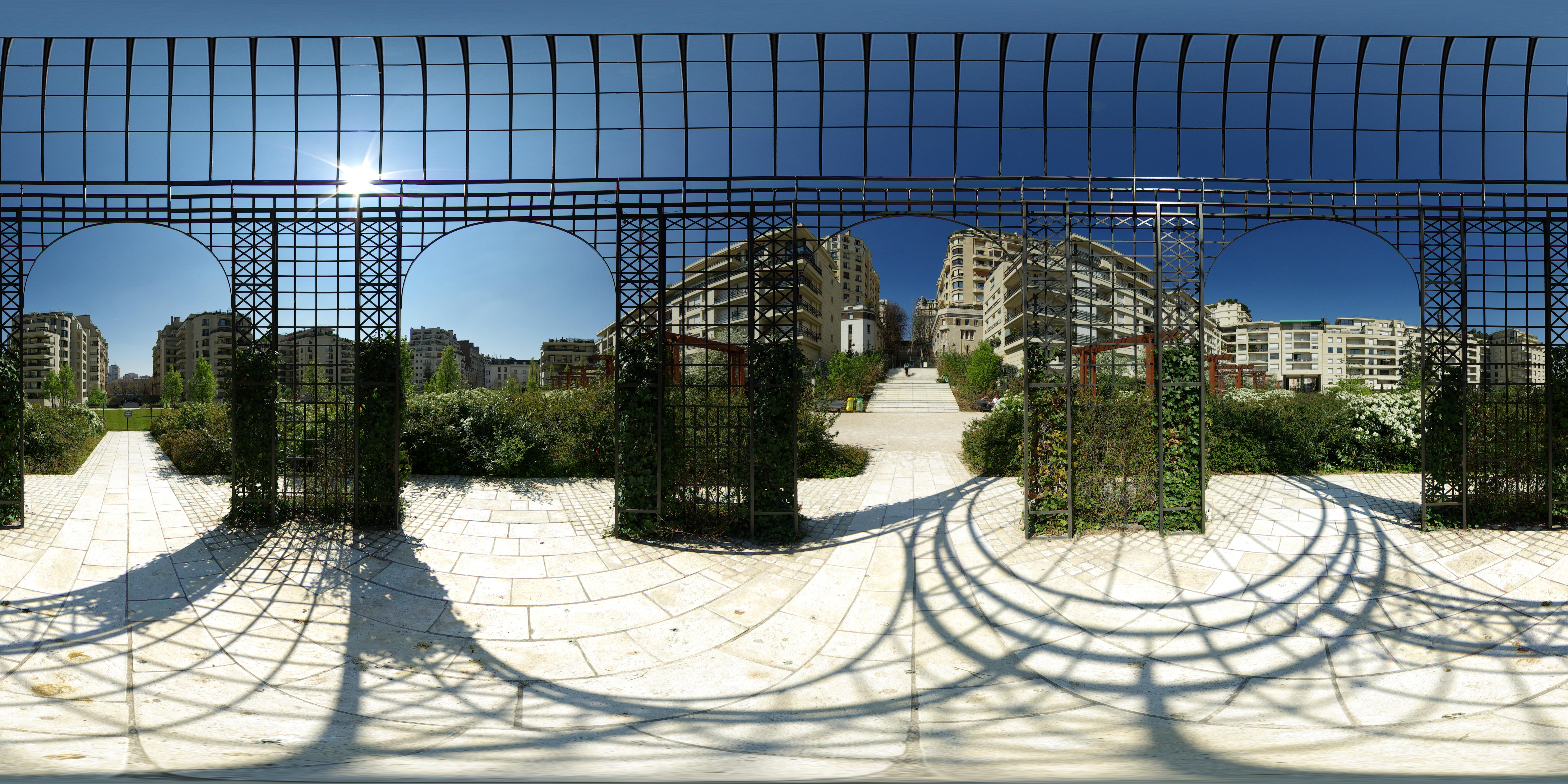 Parc de Passy